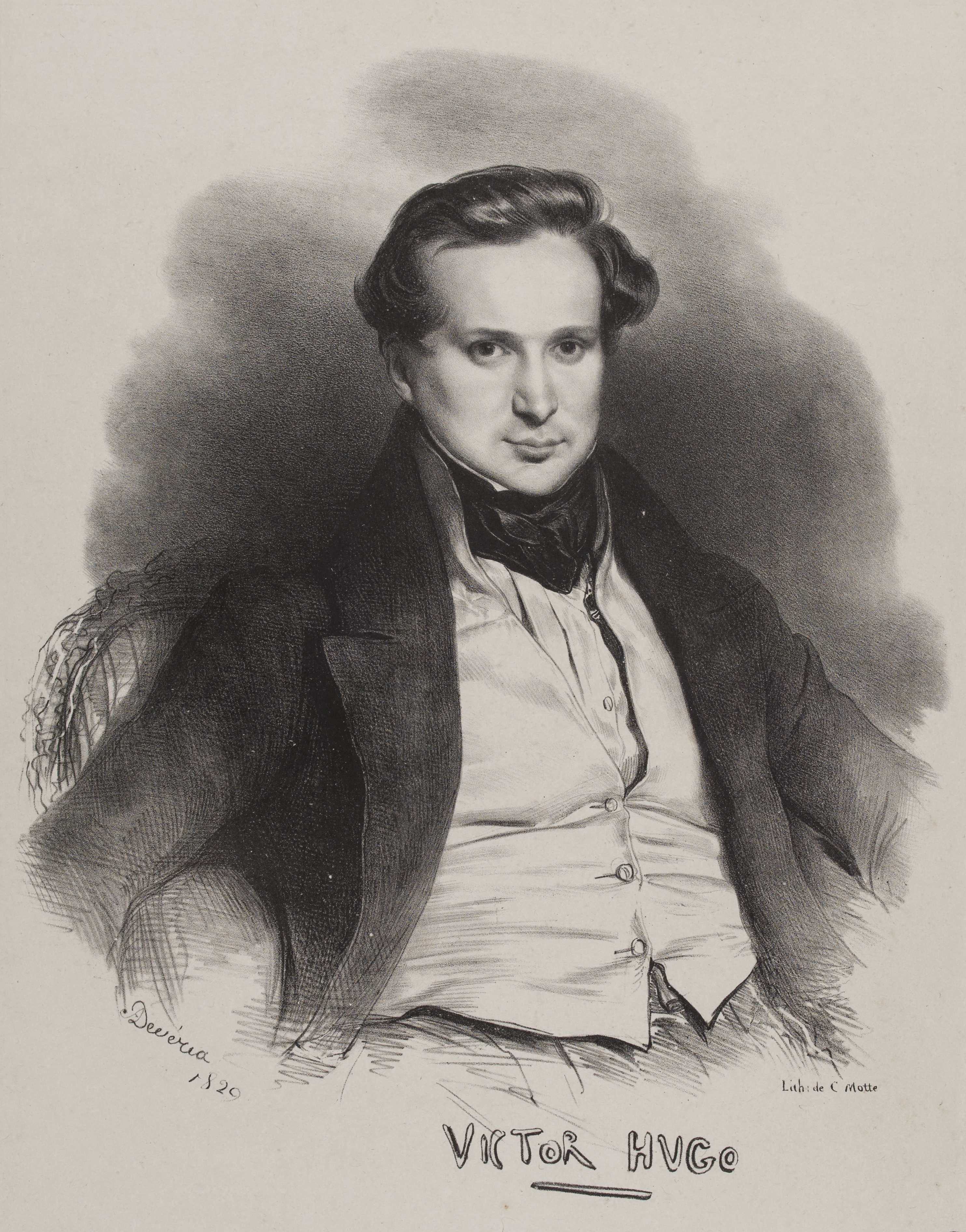 Achille Devéria (Français, 1800-1857) : Portrait de Victor Hugo jeune, 1829, lithographié par Charles Motte, musée Carnavalet.